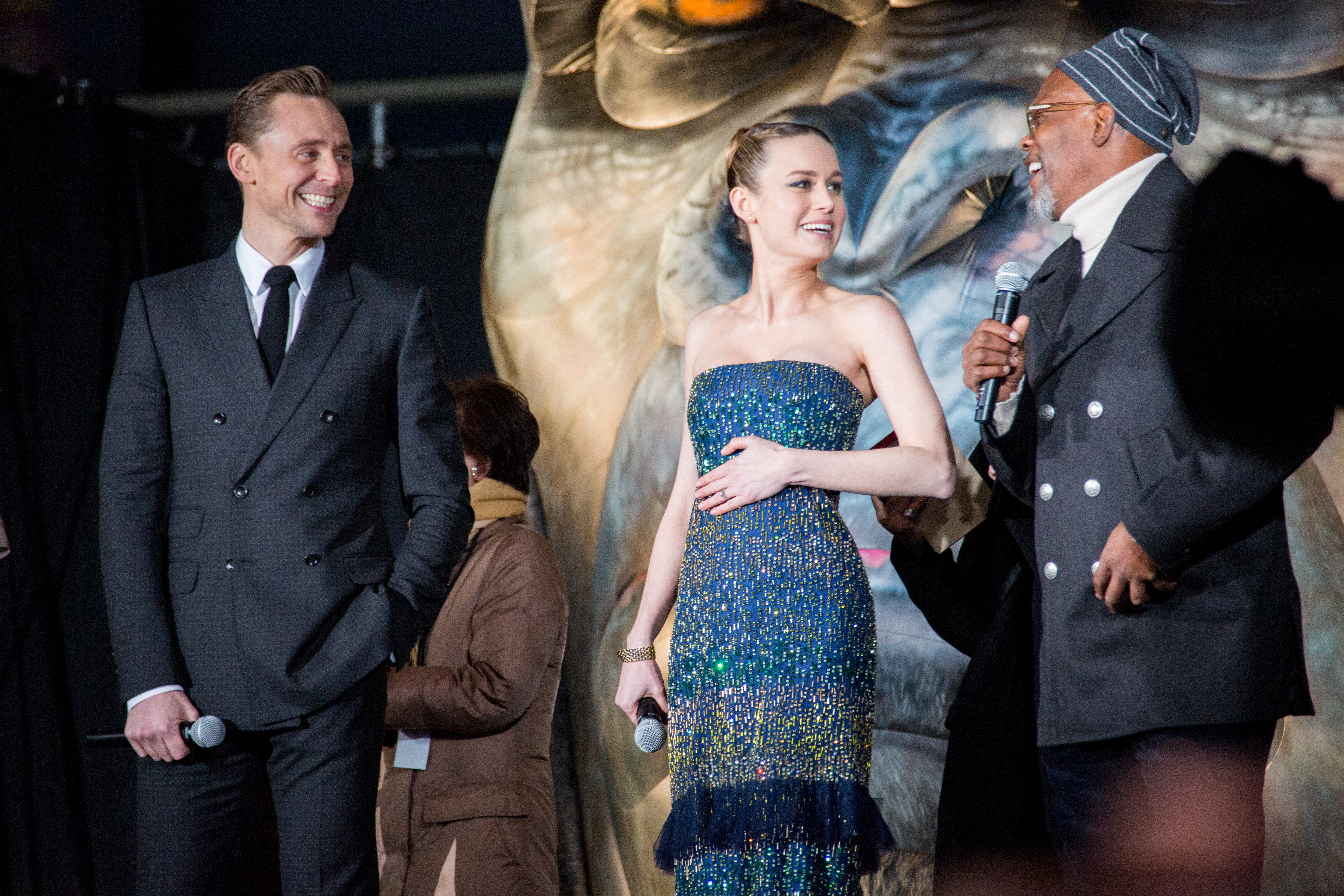 キングコング: 髑髏島の巨神 ジャパンプレミア レッドカーペット トム・ヒドルストン ブリー・ラーソン サミュエル・L・ジャクソン